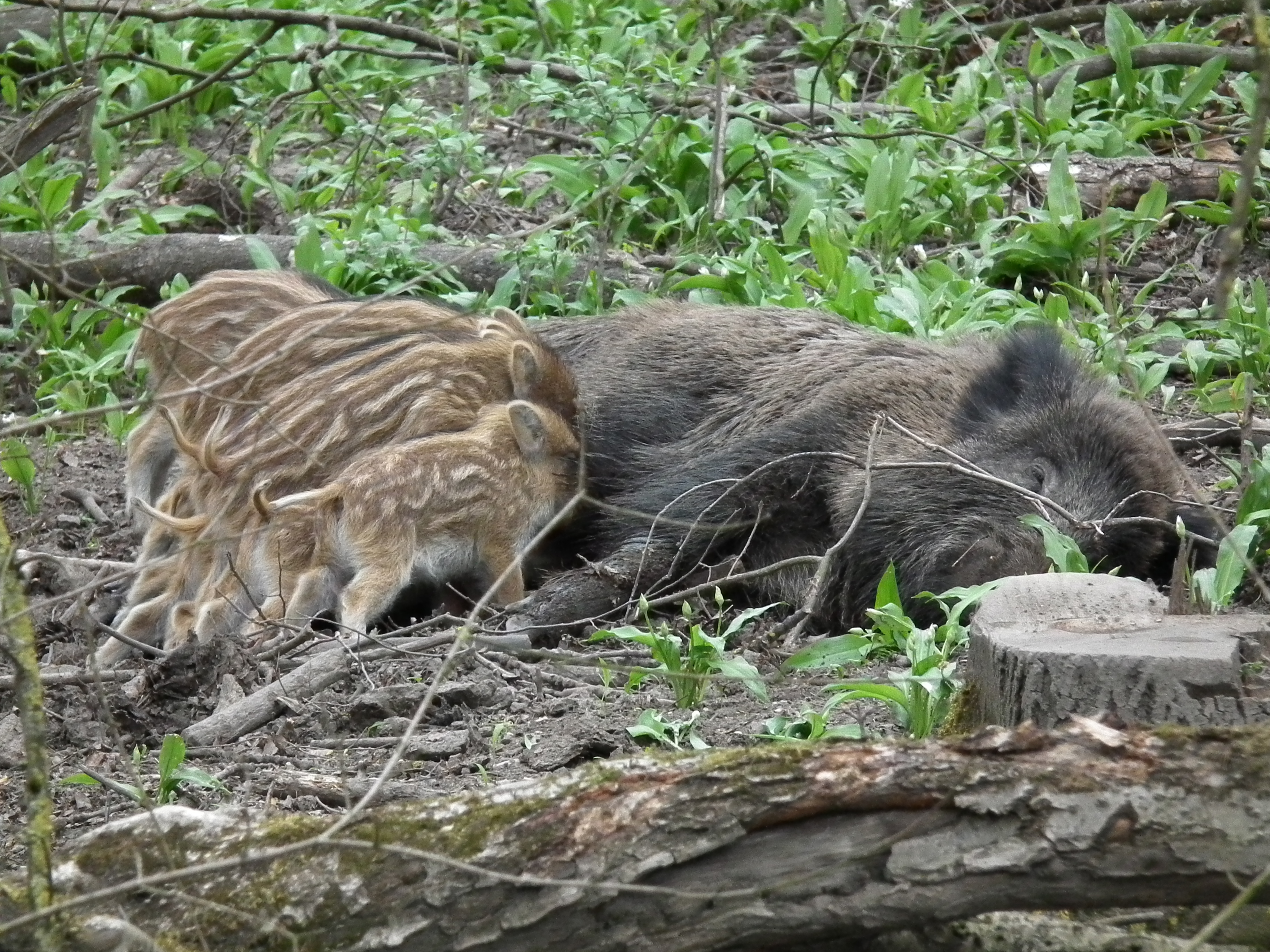 Säugende Wildschweinbache (Sus scrofa) mit ihren Frischlingen, fotografiert in einem Gehege auf der Ketscher Rheininsel (Baden-Württemberg, Deutschland)